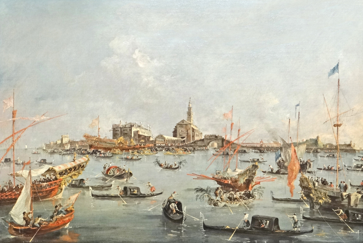 Le doge de Venise sur le Bucentaure, à San Nicolo du Lido, le jour de l'Ascension vers 1775-1780 Venise Œuvre de Francesco Guardi (1712-1793) huile sur toile Au centre, le bassin de Saint-Marc qui sépare Venise de l'île du Lido (au fond) au niveau de l'église San Nicolo. "Après les cérémonies du Mariage de Venise avec la mer, le doge se rend à San Nicolo pour écouter la messe avant de retourner à Venise. Il s'apprête à remonter à bord du Bucentaure après être passé sous un dais tendu pour l'occasion. " extrait du cartel Tableau exposé au musée du Louvre (salle de la peinture vénitienne) Saisie révolutionnaire de la collection du comte de Pestre de Seneffe, 1797